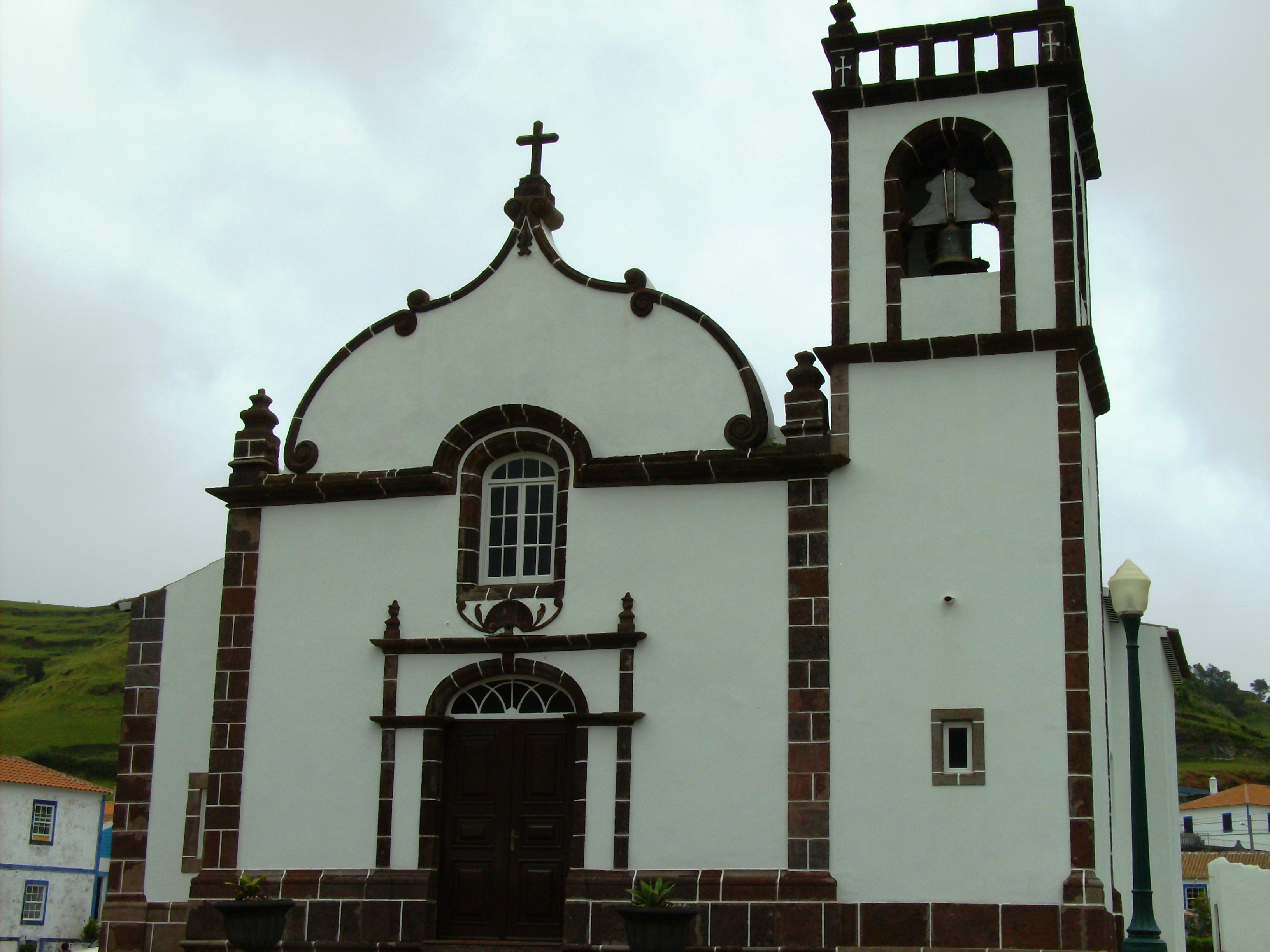 Igreja de Santa Bárbara, freguesia de Santa Bárbara, concelho da Vila do Porto, ilha de Santa Maria, Açores.